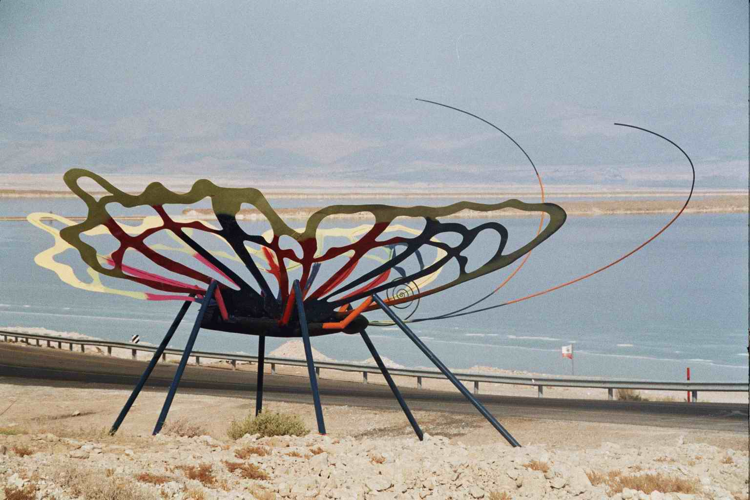 פסל: ישראל פרימו, עבודת ברזל בנפחים. 400/700 ס"מ